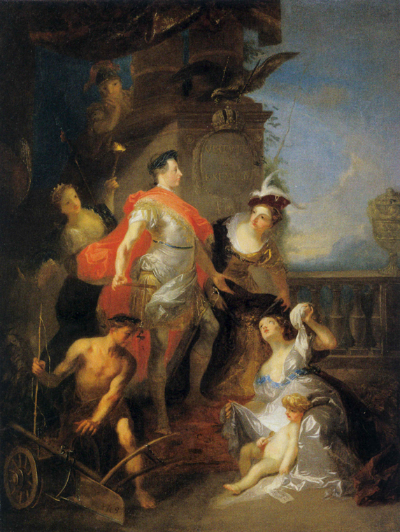 Franz Anton Maulbertsch (1724–1796): Glorifikation Kaiser Josephs II. (1741–1790), 1777, Belvedere Wien.